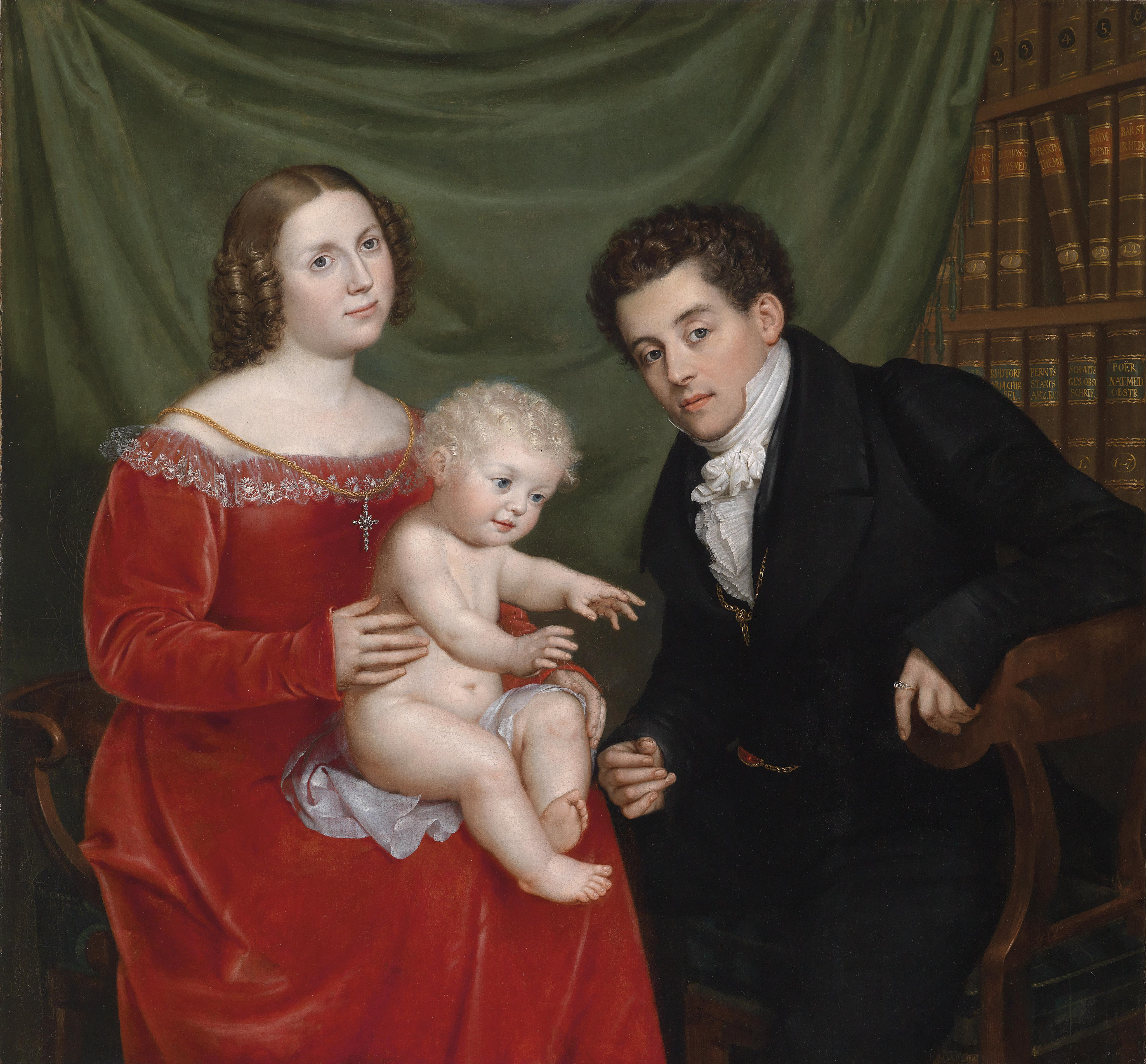 (laut Familientradition; Dr. Franz von Sidorowicz, Primararzt im Allgemeinen Krankenhaus, mit seiner Frau und seinem Kind)